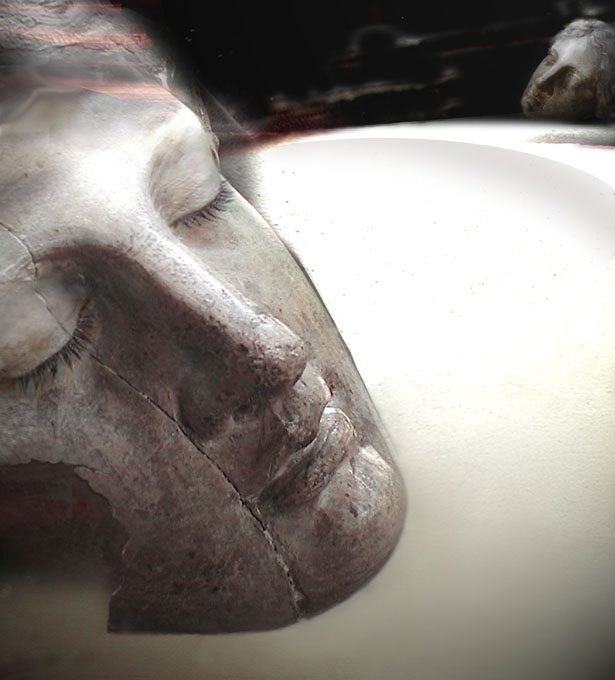 Benedek Jenő, ifj. (Csongrád, 1939. június 13.– 2019. augusztus 20.) festőművész alkotása: Álomban, 2004, computergrafika, 30x27 cm